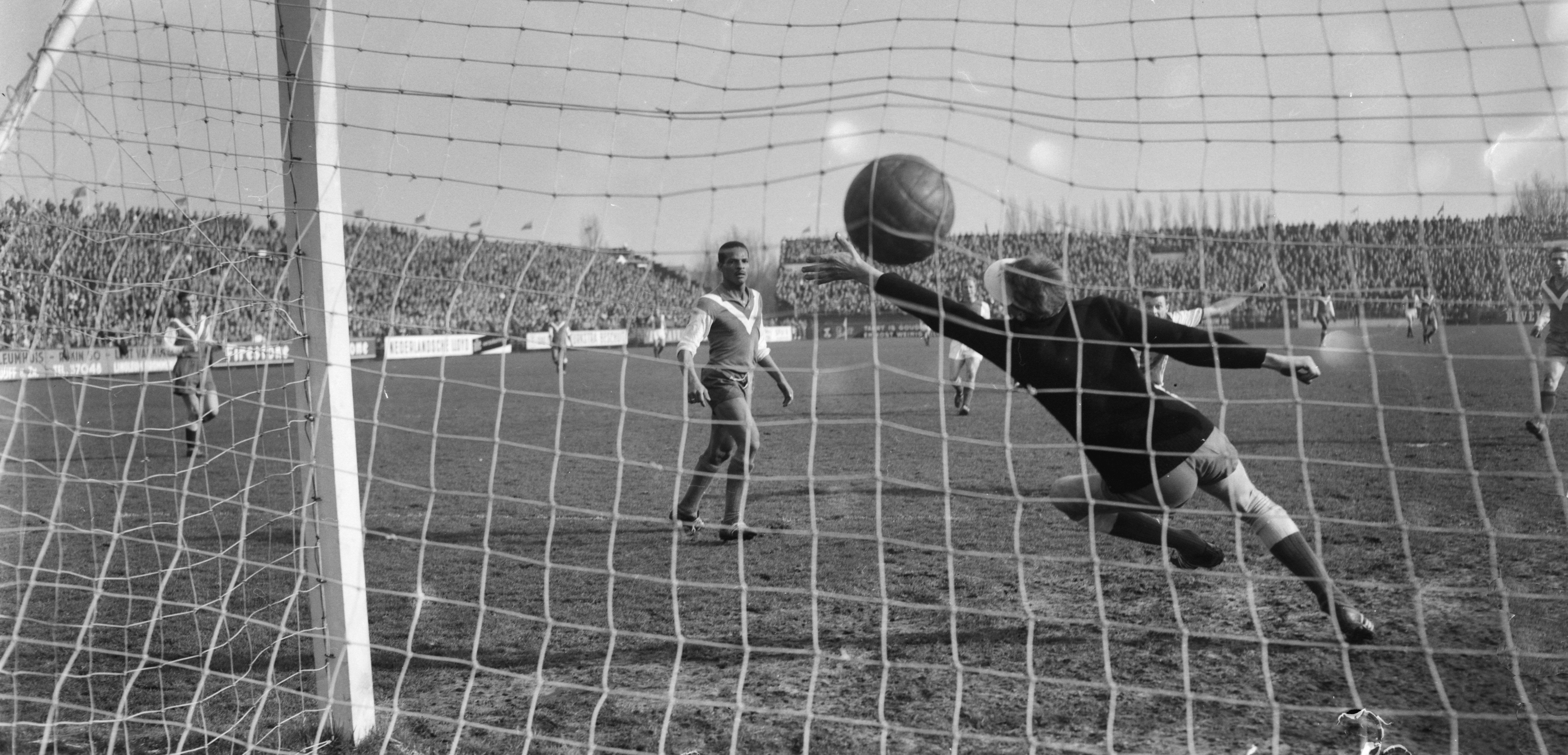 Collectie / Archief : Fotocollectie Anefo Reportage / Serie : [ onbekend ] Beschrijving : Ajax tegen Elinkwijk 6-1. Mijnals, Keeper Volder en Westra Datum : 5 maart 1961 Fotograaf : Bilsen, Joop van / Anefo Auteursrechthebbende : Nationaal Archief Materiaalsoort : Negatief (zwart/wit) Nummer archiefinventaris : bekijk toegang 2.24.01.04 Bestanddeelnummer : 912-1728